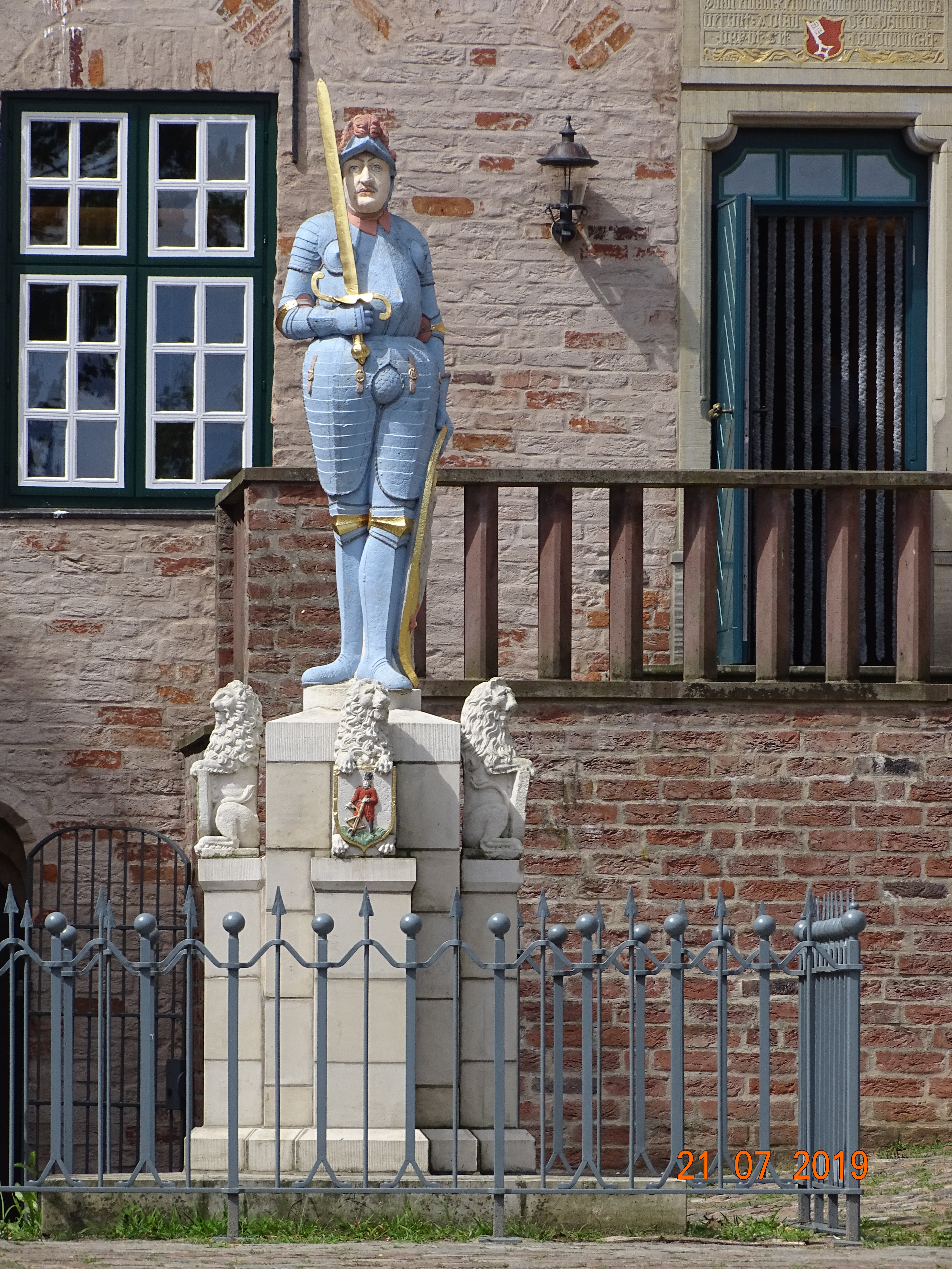 Roland-Standbild in Bad Bederkesa